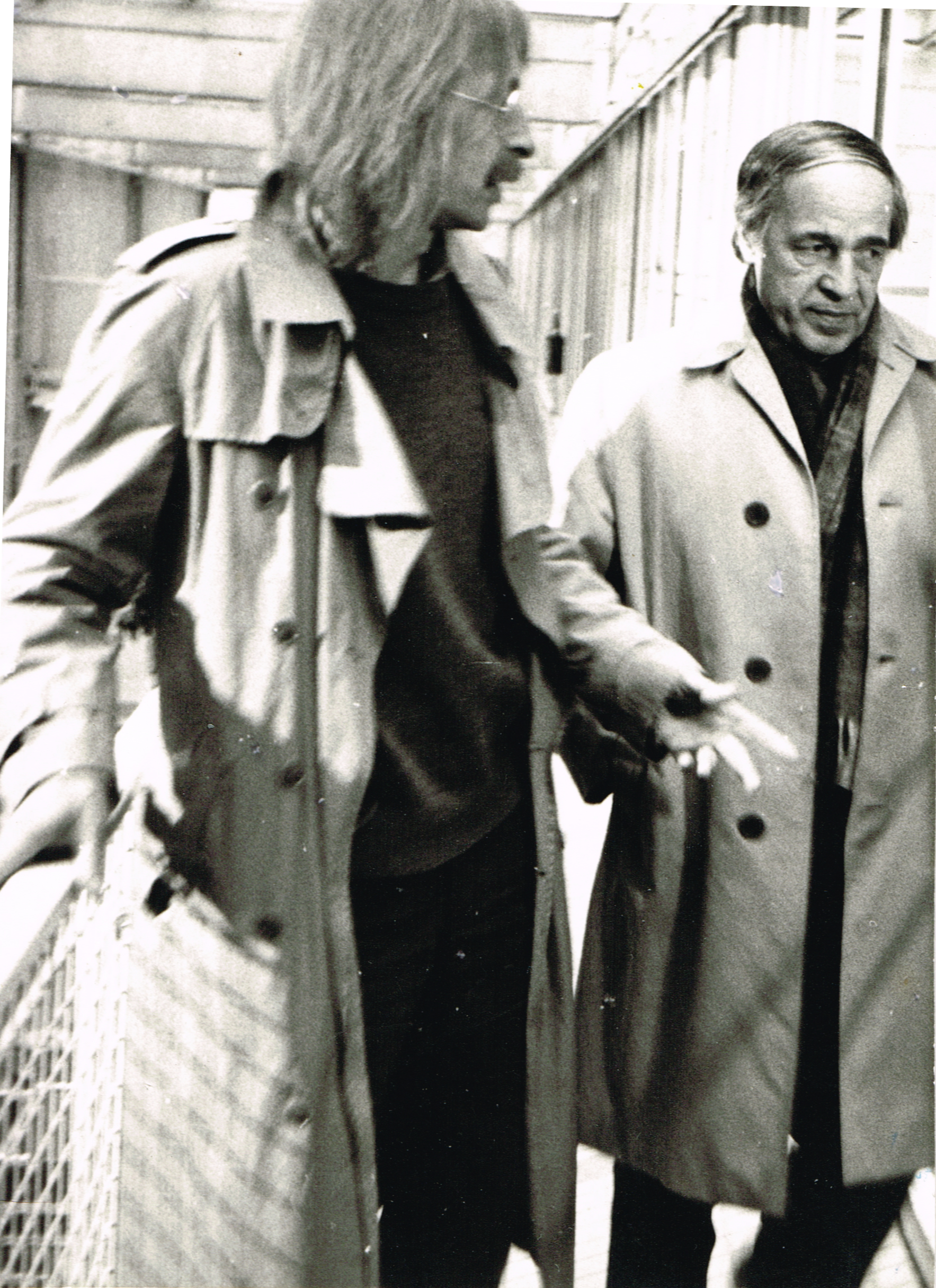 Gerhard Götze (links) mit dem Komponisten, Dirigenten und Publizisten musikalischer Betrachtungen zur Moderne, Pierre Boulez. Mit und von Boulez hat Götze zwei Dokumentarfilme 1985 in Paris gemacht.